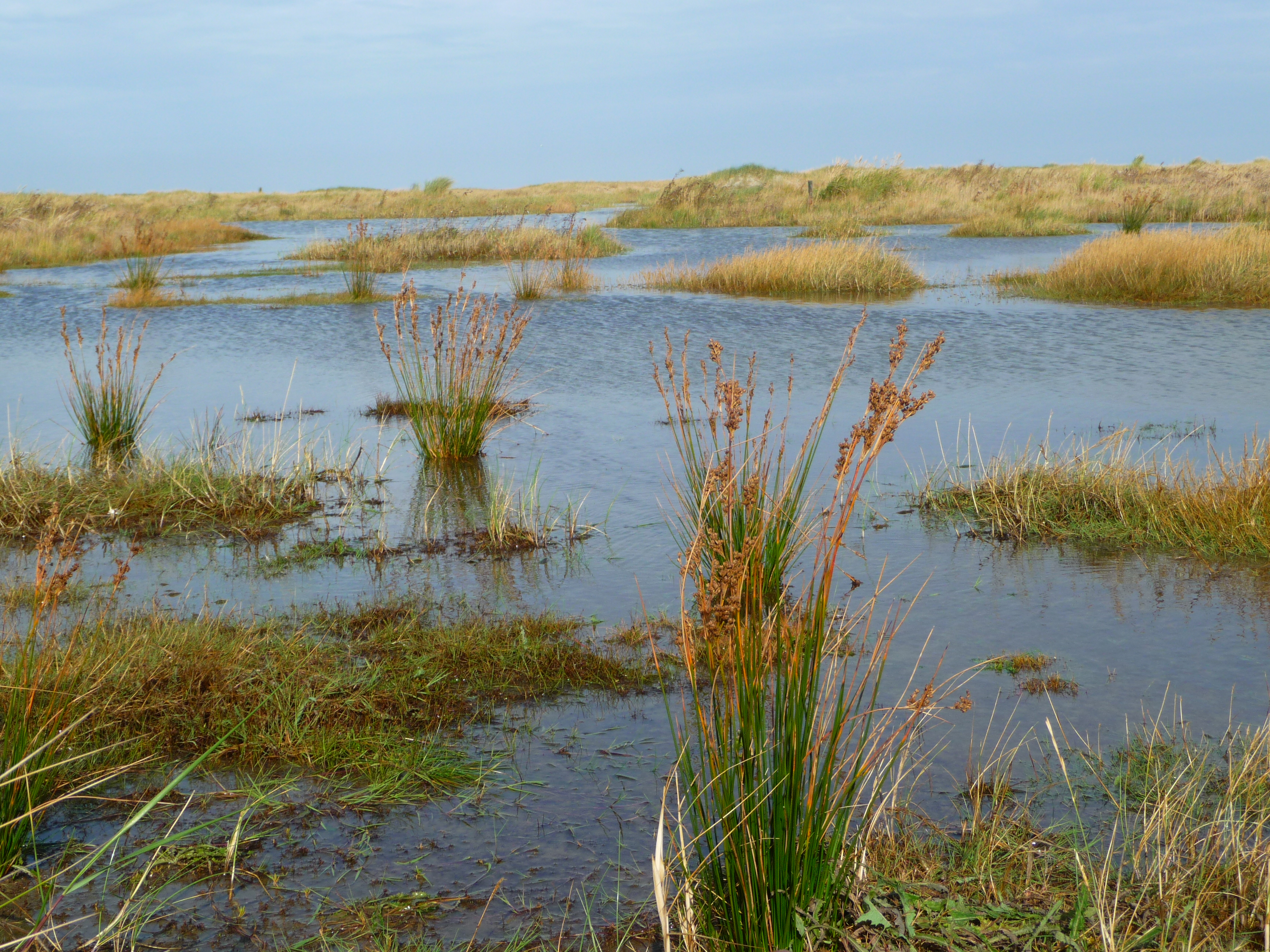 Meerstrand-Binse (Juncus maritimus), fotografiert am Kalfamer, der Ostspitze der ostfriesischen Nordseeinsel Juist (Niedersachsen, Deutschland)